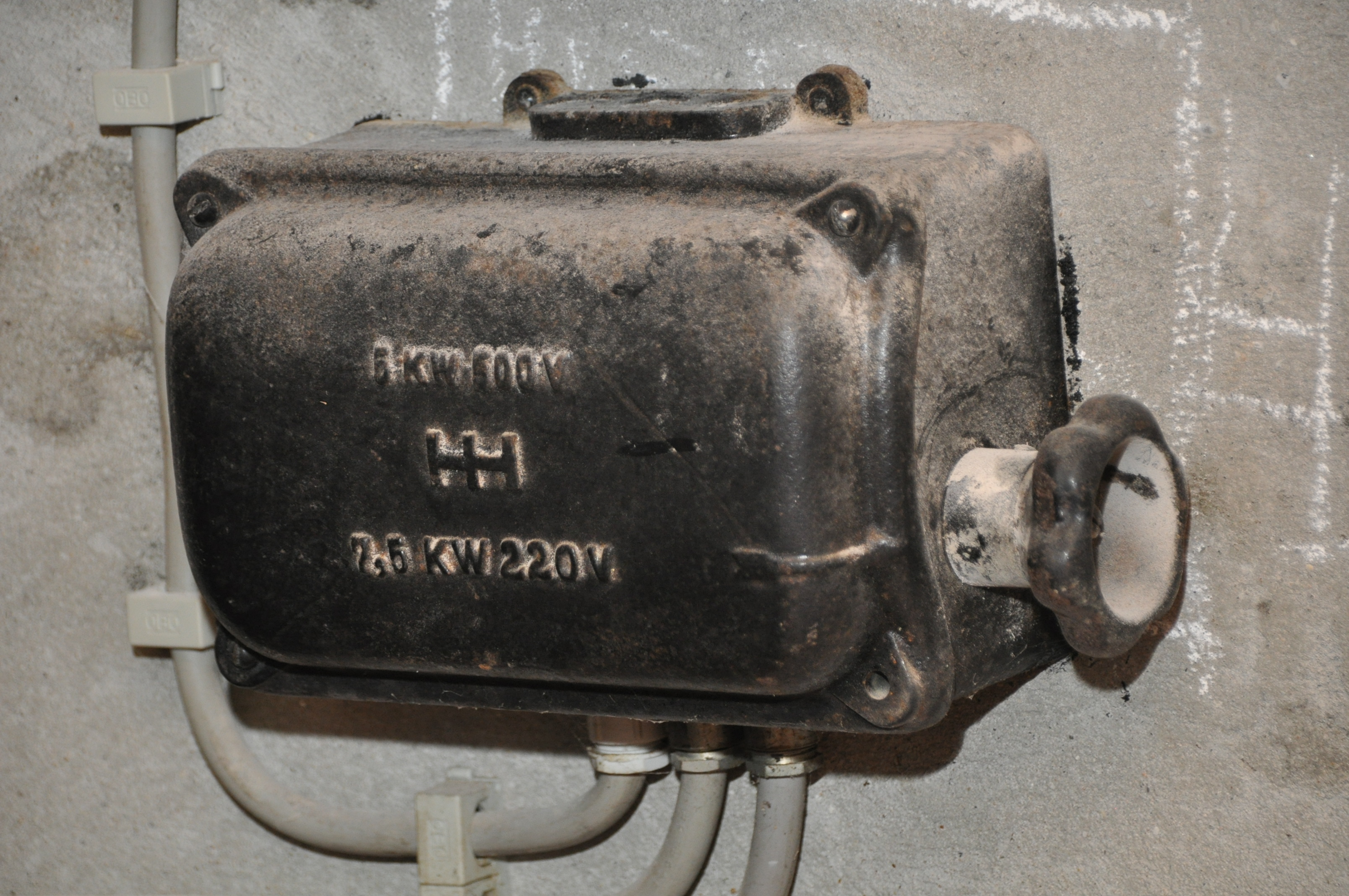 Molen De Hoop Zoetermeer op Open monumentendag 2011 42″ N, 4° 29′ 52.27″ E